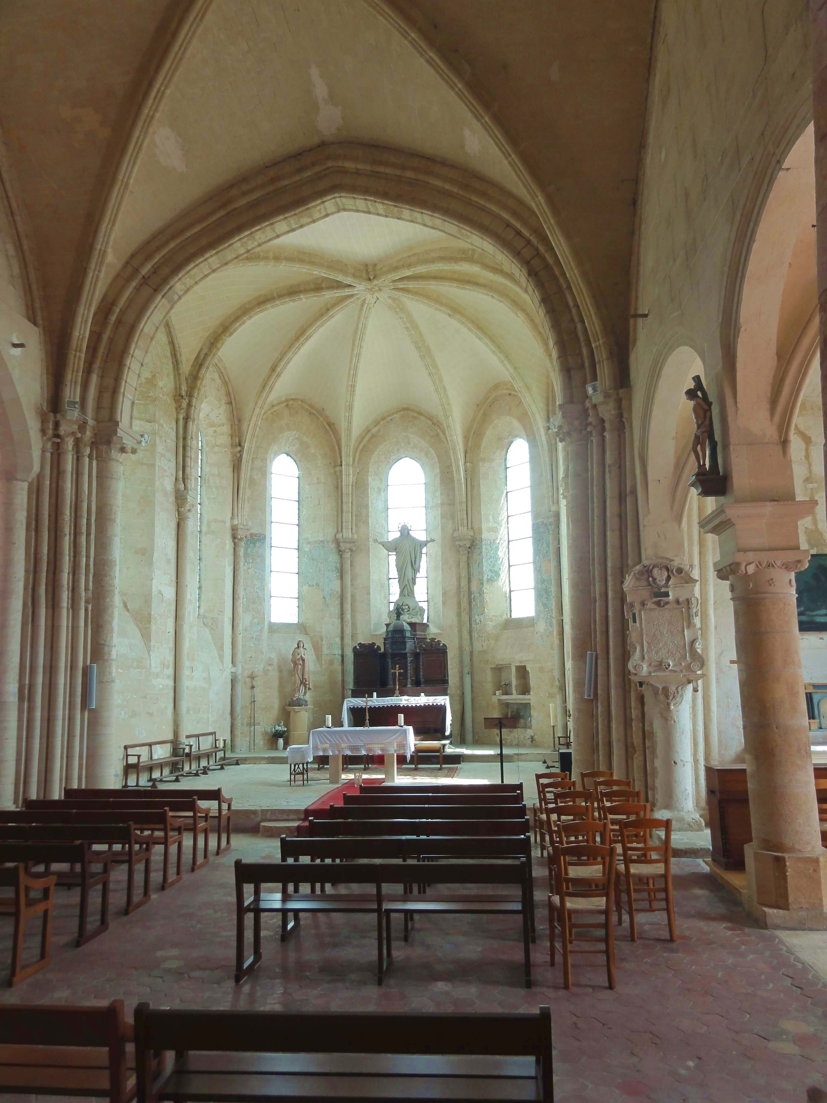 Intérieur de l'église (voir titre).